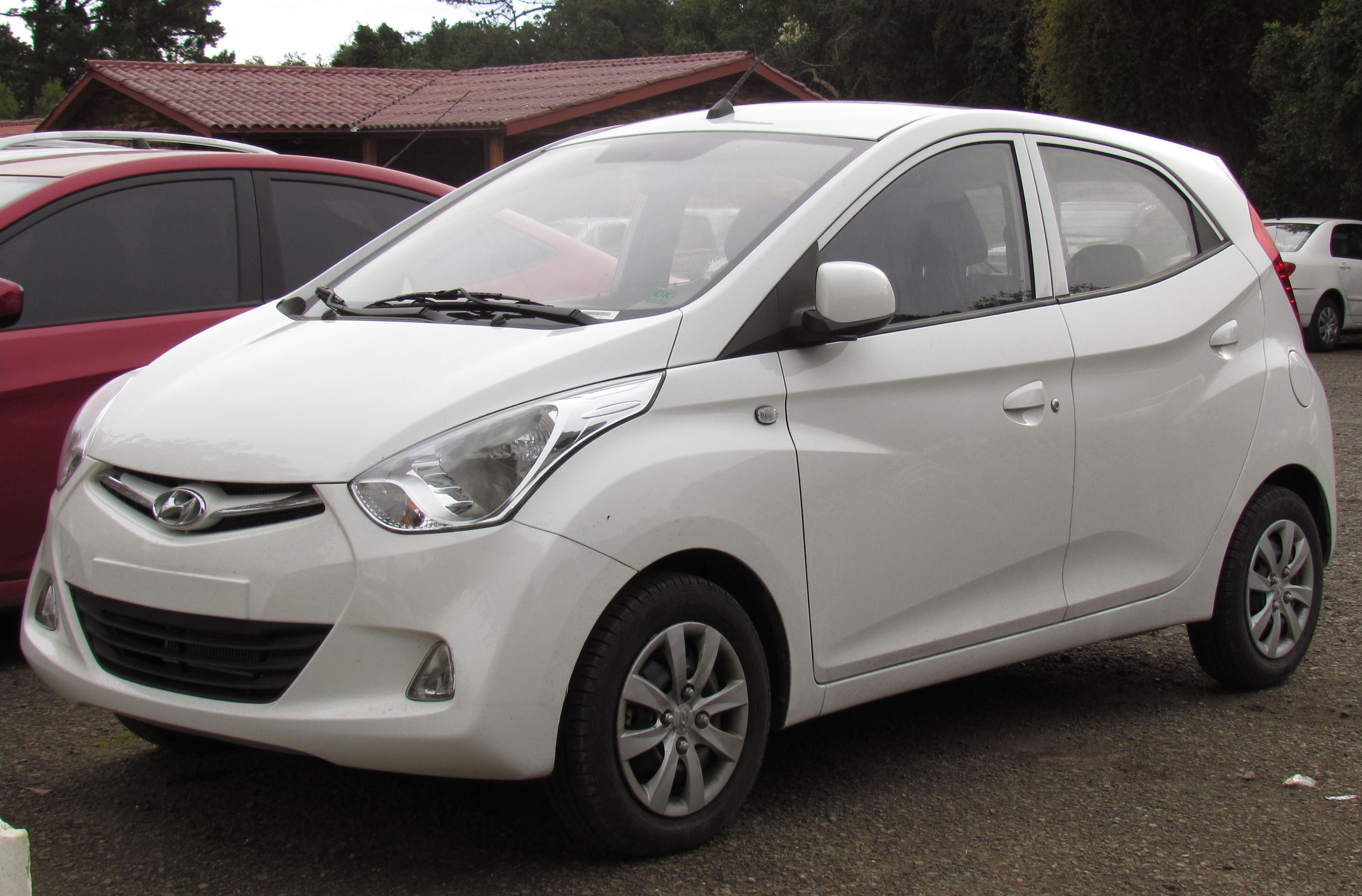 Hyundai Eos GL 2014